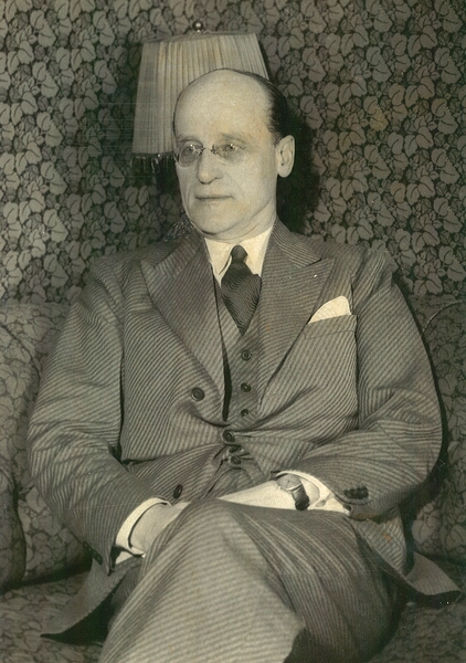 portrett, mann, filolog, professor i keltiske språk, sittende knefigur.